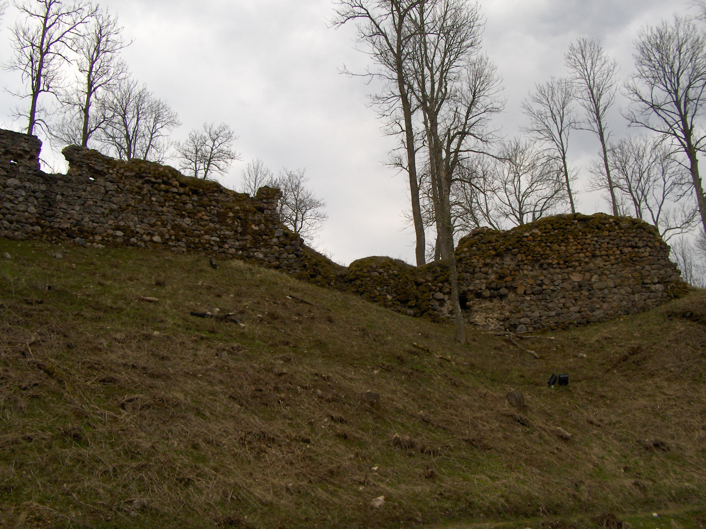 Helme lossipark